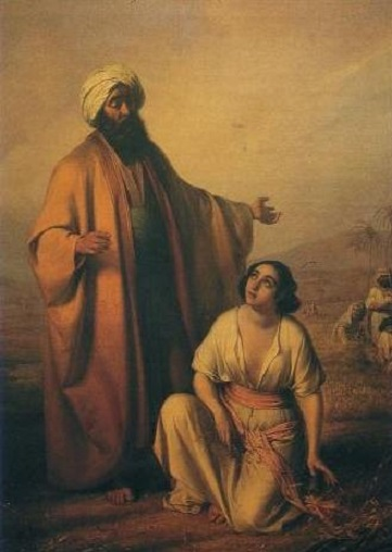 Incontro di Booz con Ruth, olio su tela, Seminario vescovile di Pordenone